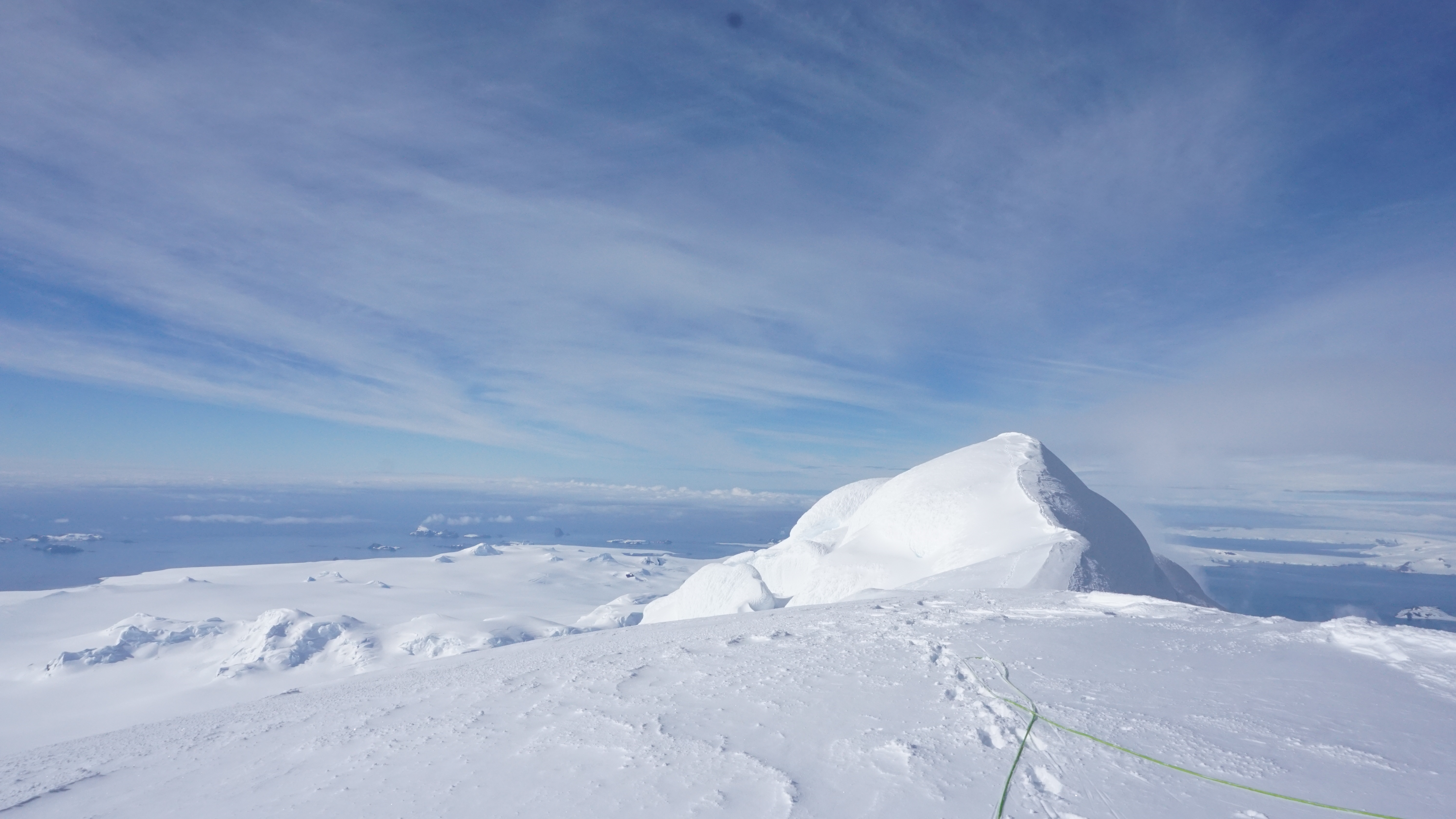 Св. Борис от Юг по билото на планината